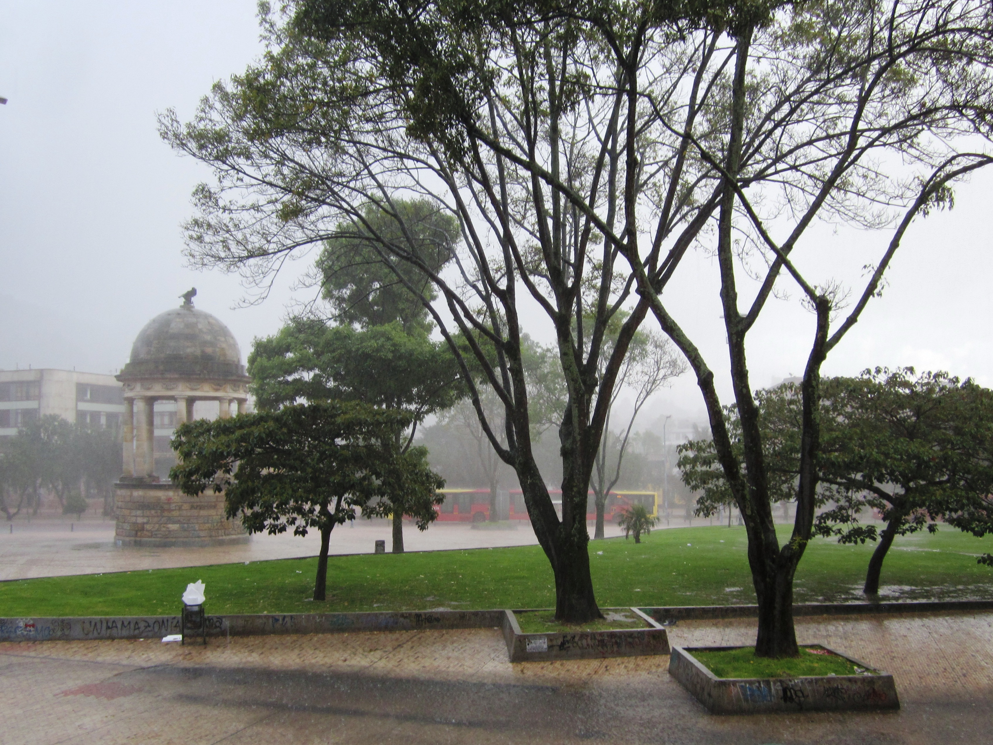 Bogotá Parque de los Periodistas, día de lluvia